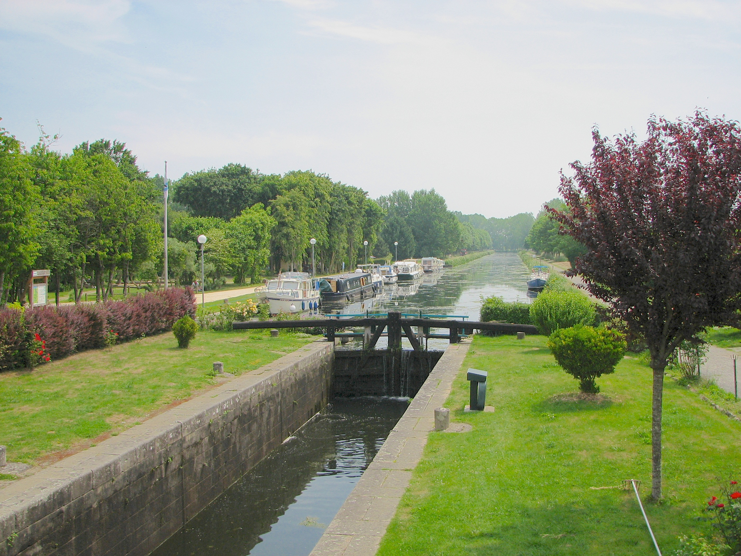 Canal d'Ille et Rance à Evran (Côtes d'Armor)